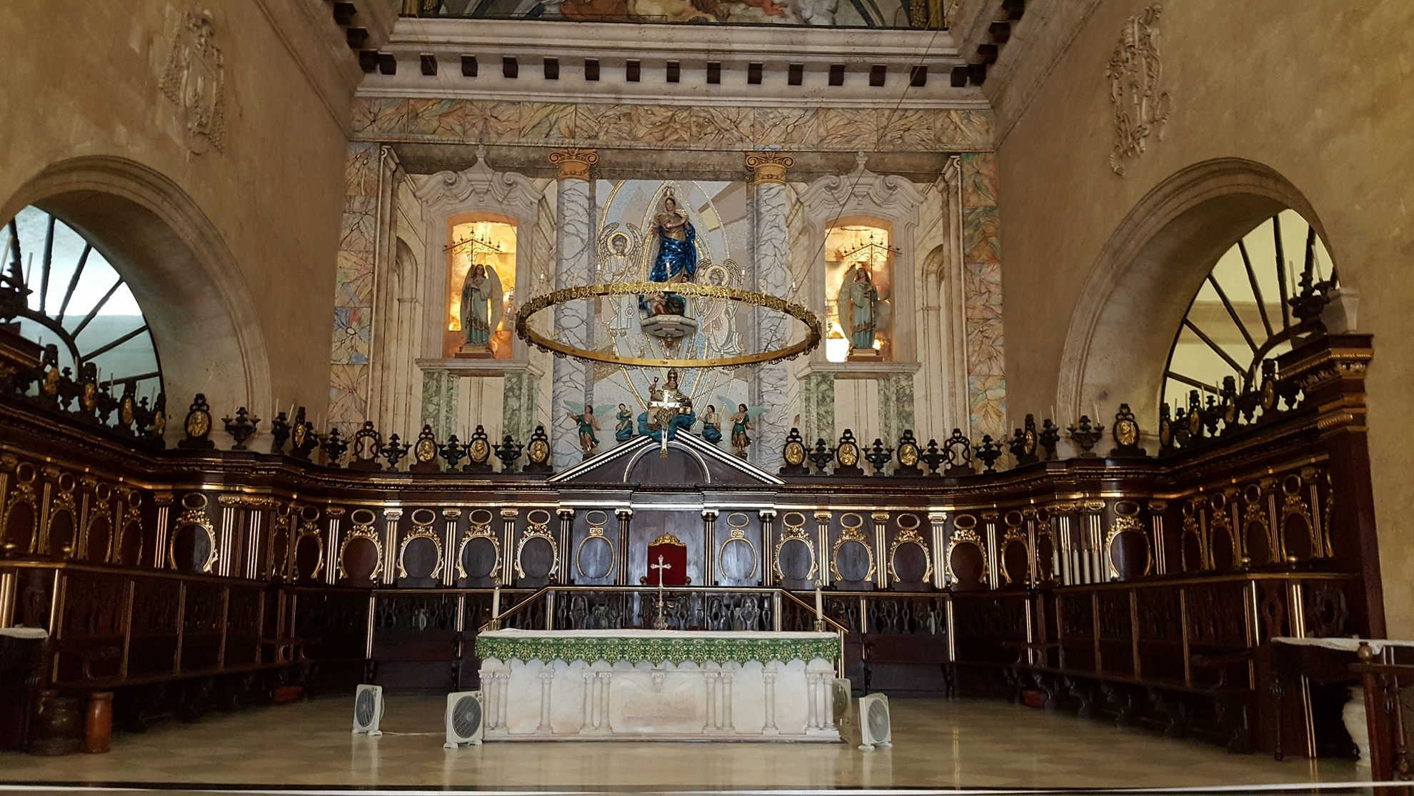 Havana, Cuba